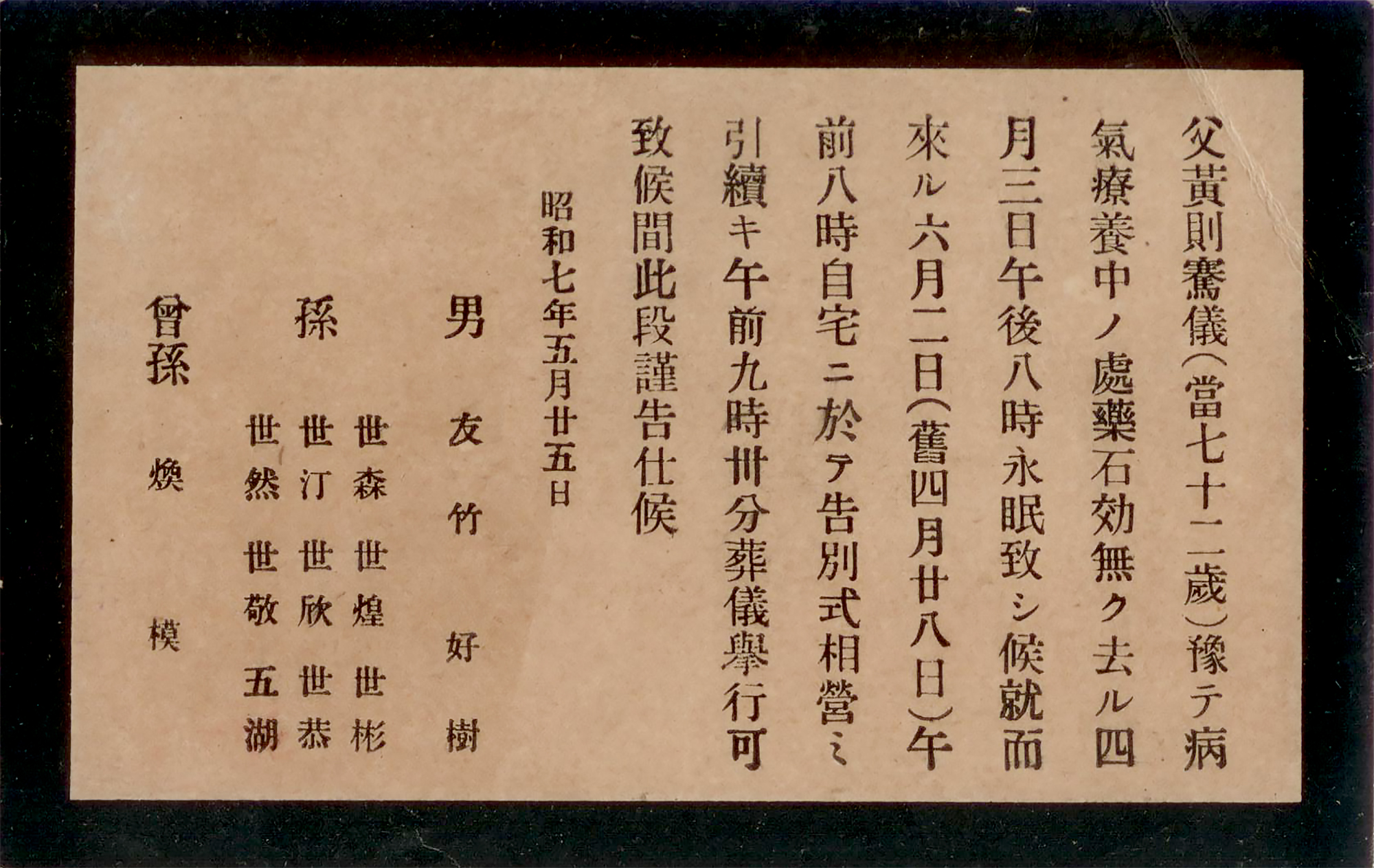 中文（台灣）: 昭和7年5月25日，台灣日治時期仕紳黃則騫的訃聞。